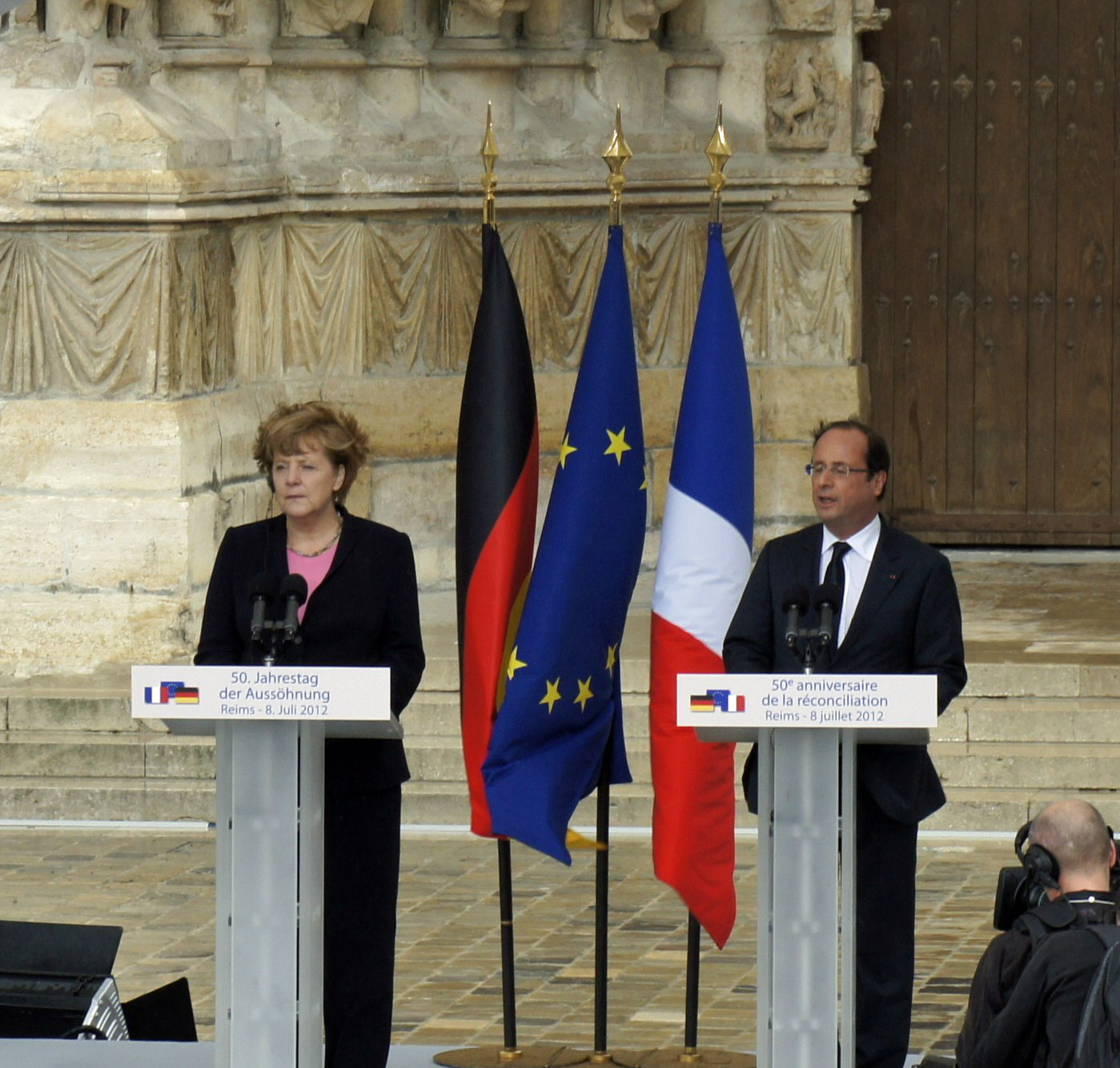 50. Jahrestag des Treffens zwischen Adenauer/de Gaulle in Reims.